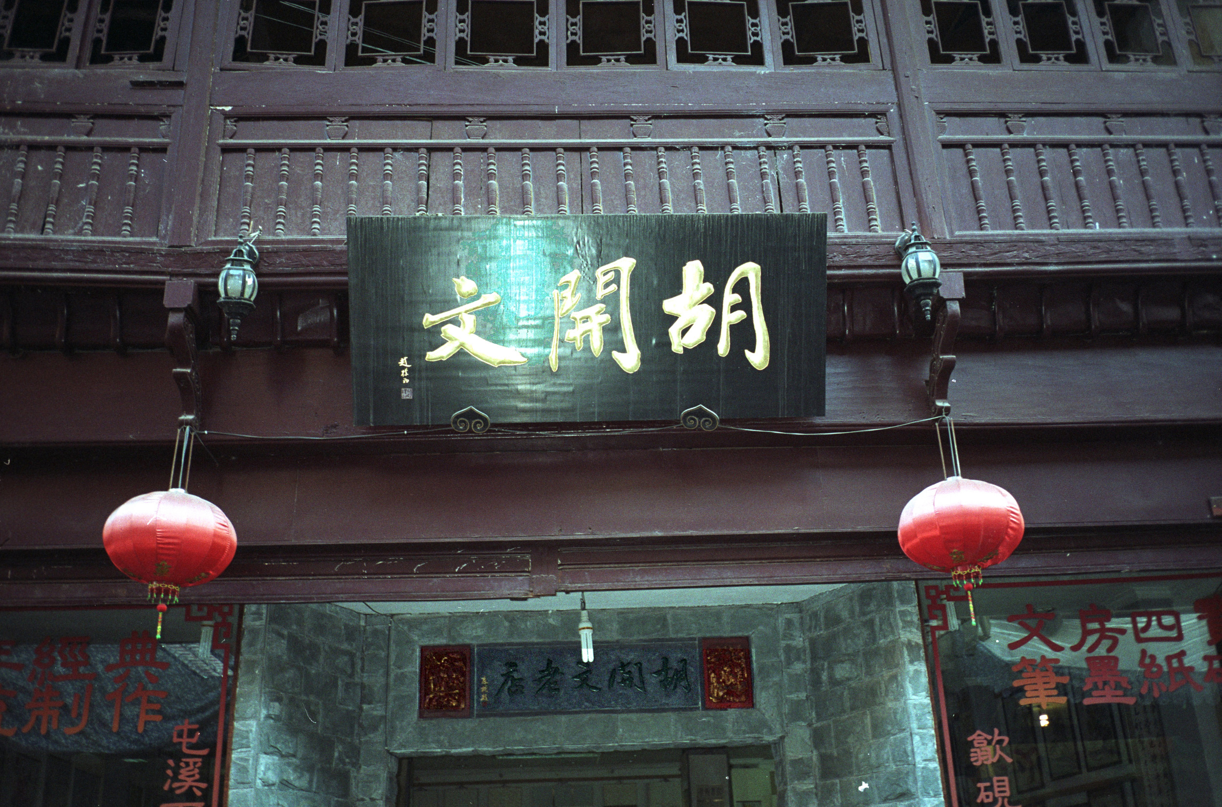 Ink maker Hu Kaiwen in Tunxi